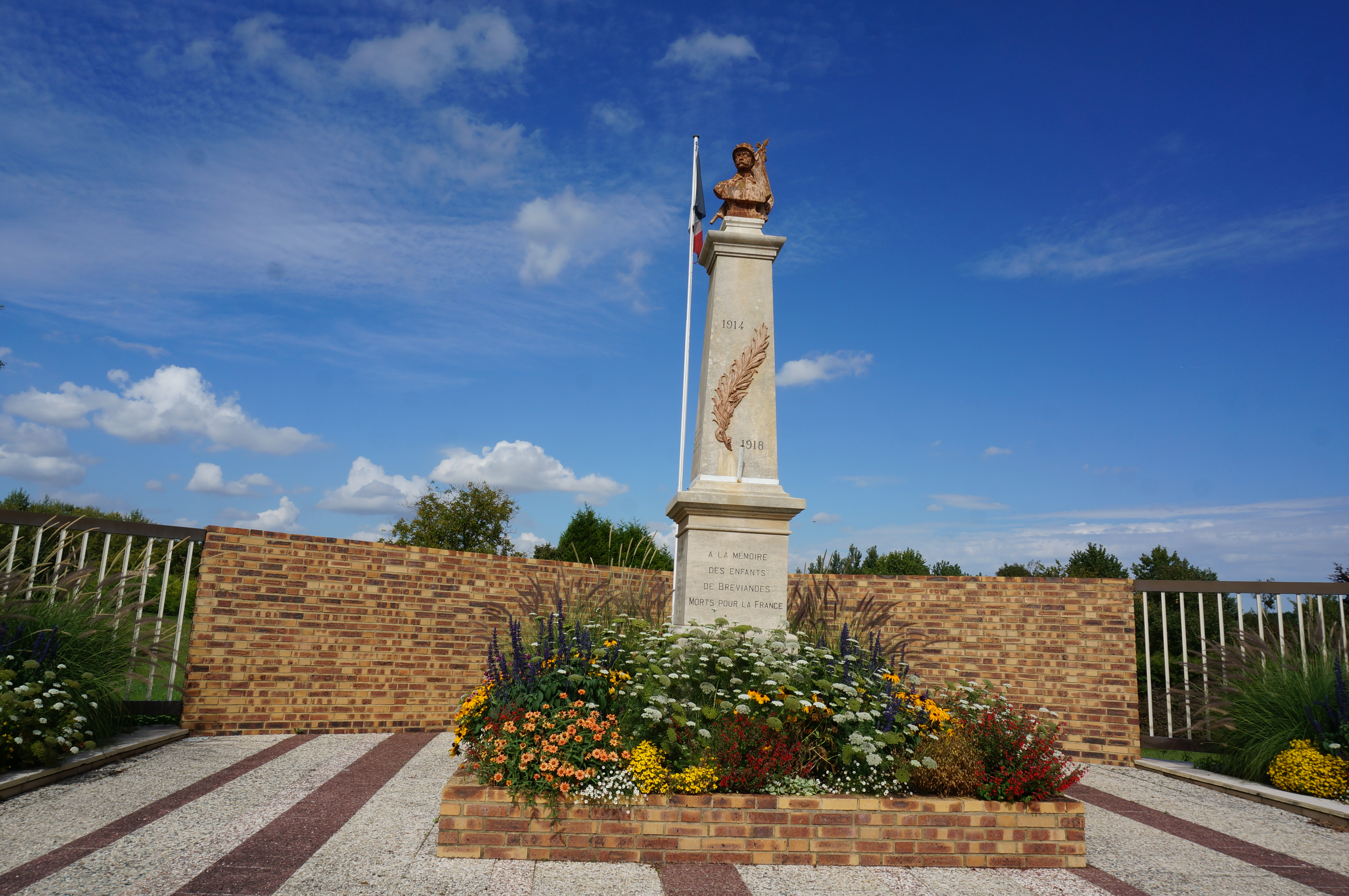 à Bréviandes.